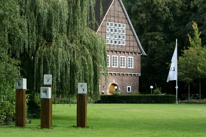 LVHS Freckenhorst Hauptgebäude